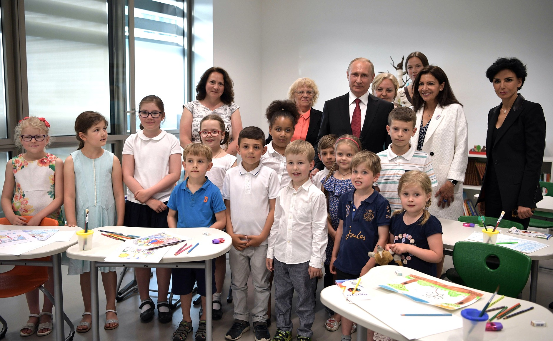 Президент России Владимир Путин во время посещения Российского духовно-культурного центра в Париже.